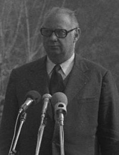 Pas de lieu. 9 Mars 1976. Vue de Michel Poniatowski, ministre de l'intérieur qui assiste aux obsèques du Commandant Le Goff.